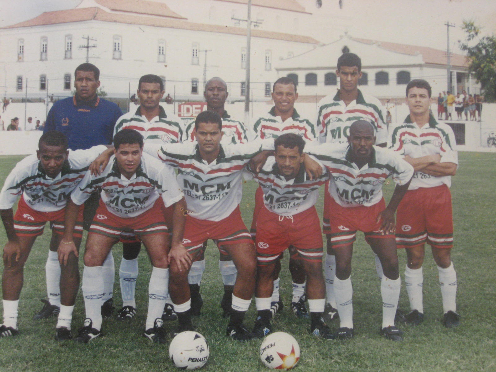 Esporte Clube Maricá perfilado.